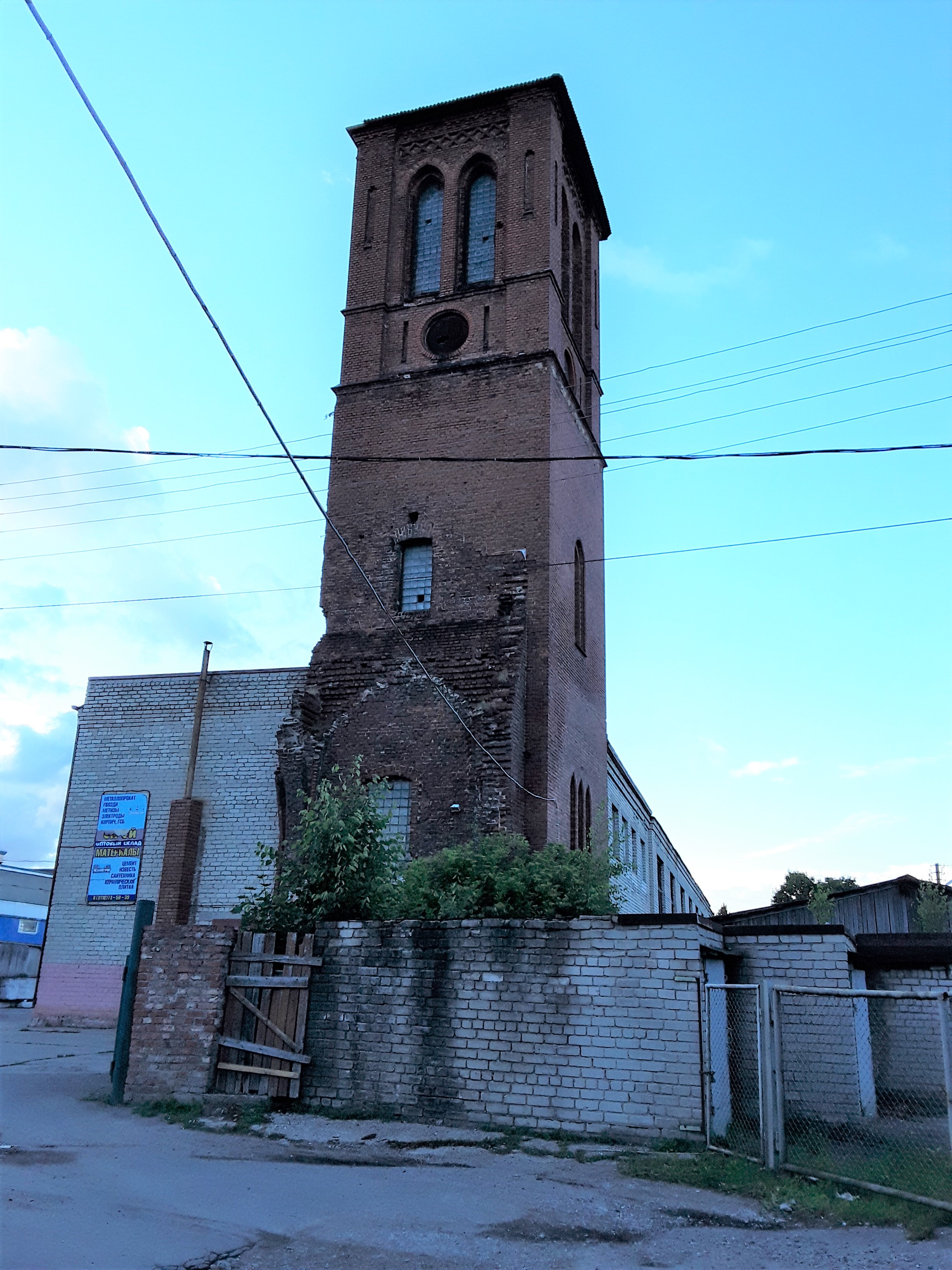 Rest der ehemaligen Reformierten Kirche in Tilsit